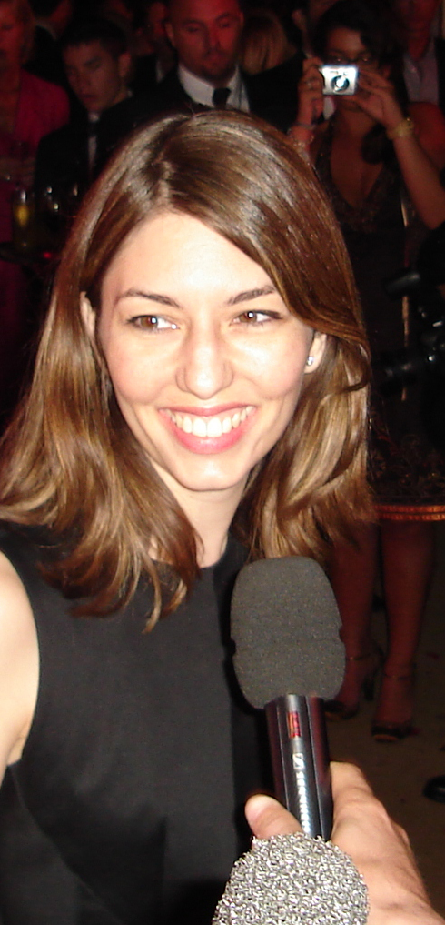 Thierry Garcia Party